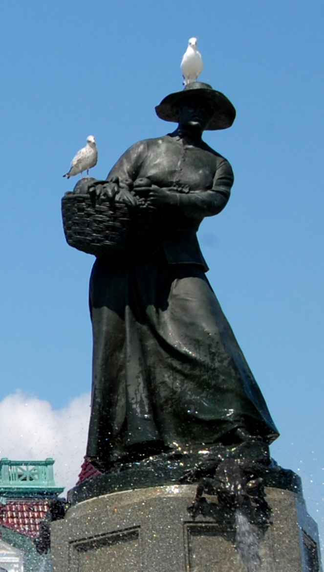 Marché Maisonneuve